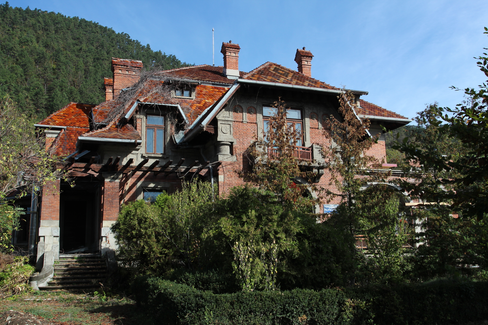 Casa Lalu